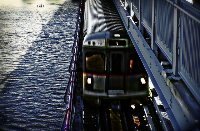 Photo d'une rame Patco